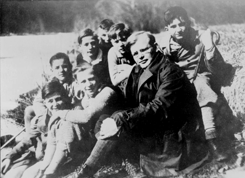 ADN-ZB/IML-ZPA Bonhoeffer, Dietrich Antifaschistischer Widersstandskämpfer geb. 4.2.1906 ermordet: 9.4.1945 in Flossenburg UBz.: Dietrich Bonhoeffer mit Schülern im Frühjahr 1932